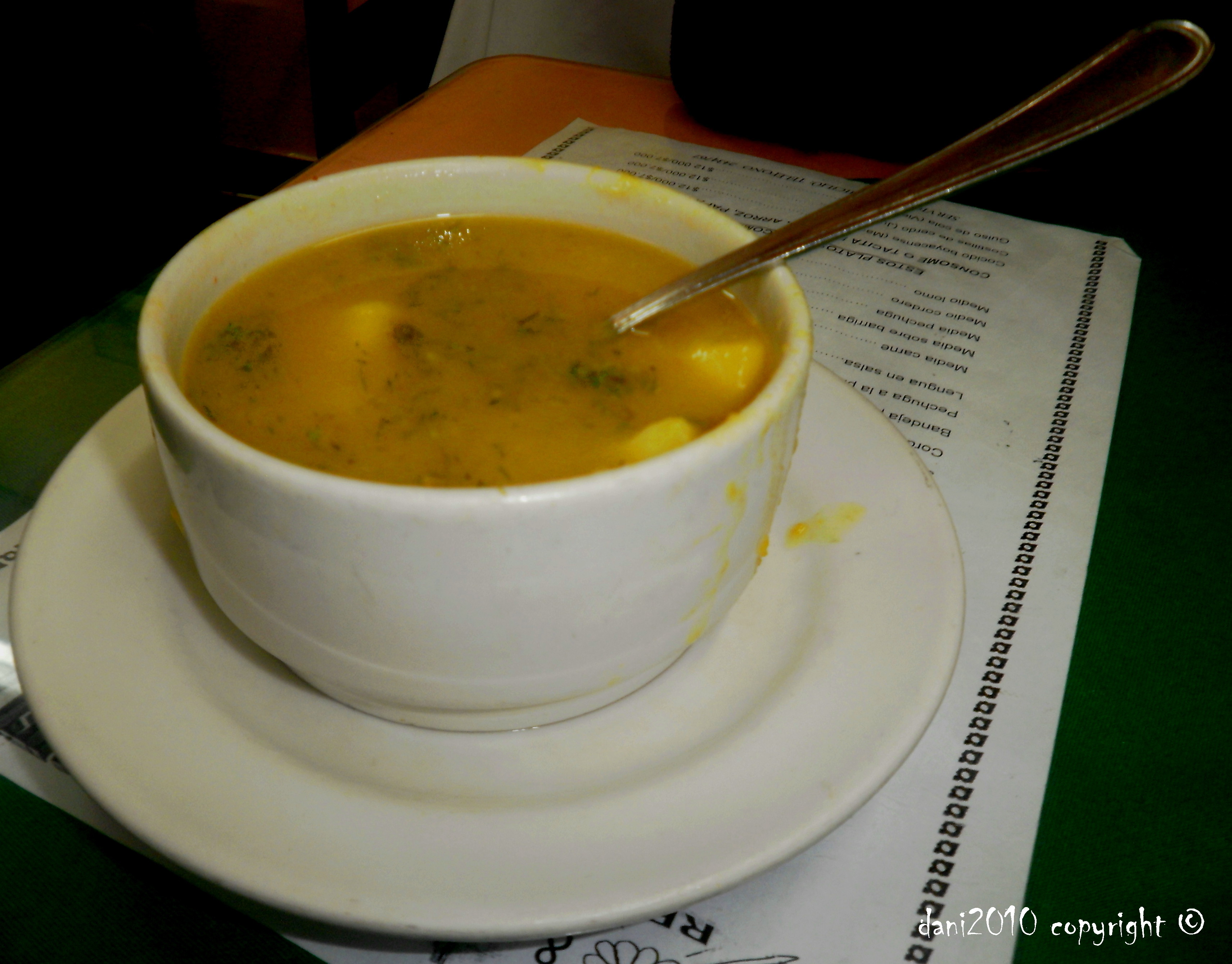 ¡Qué agusto me comí este Sancocho...!mmm...